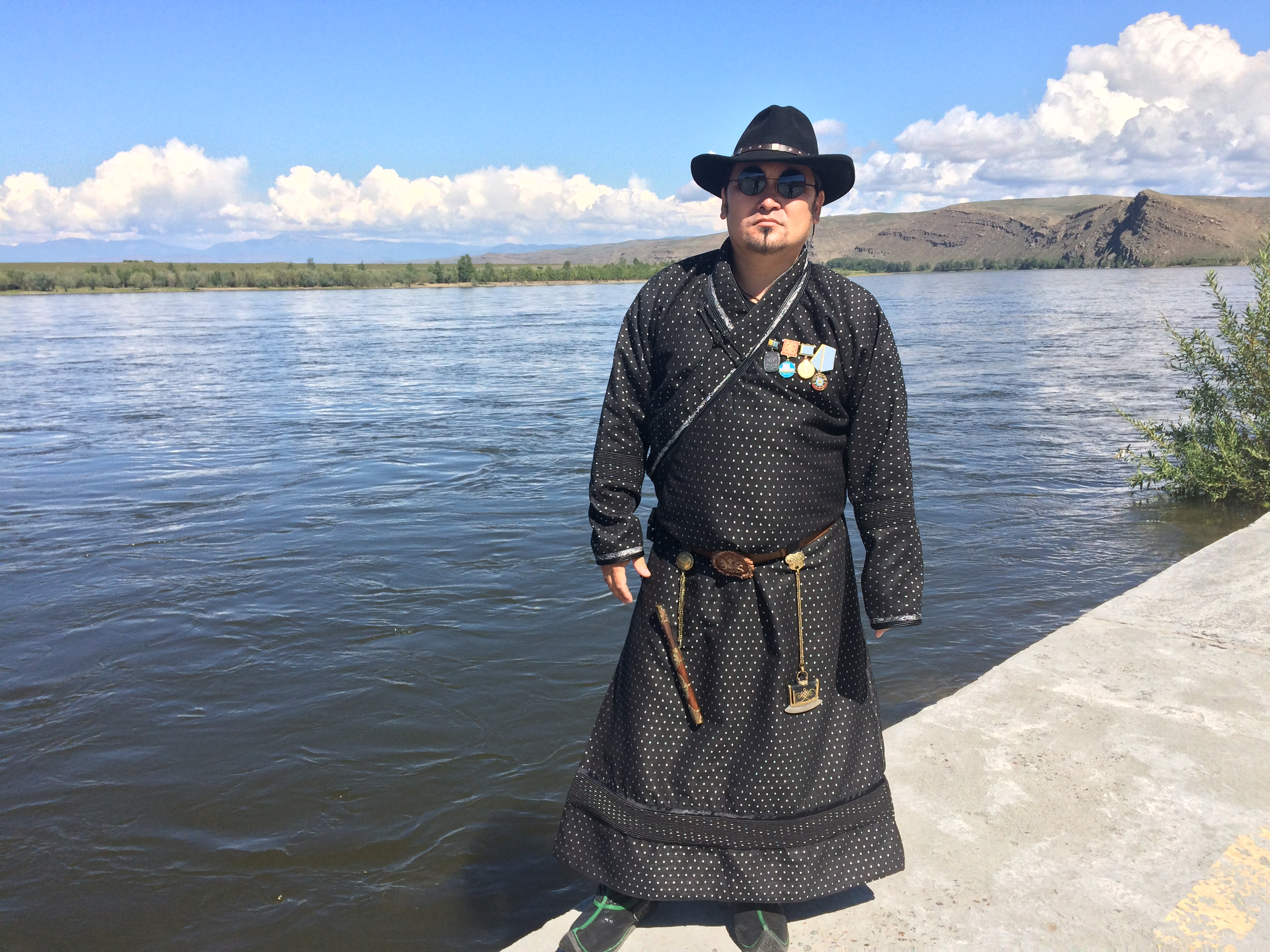 Моңгуш Сайдаш у слияния Каа-Хем и Бии-Хема. 2016 чыл. Центр Азии, Республика Тыва. Кызыл